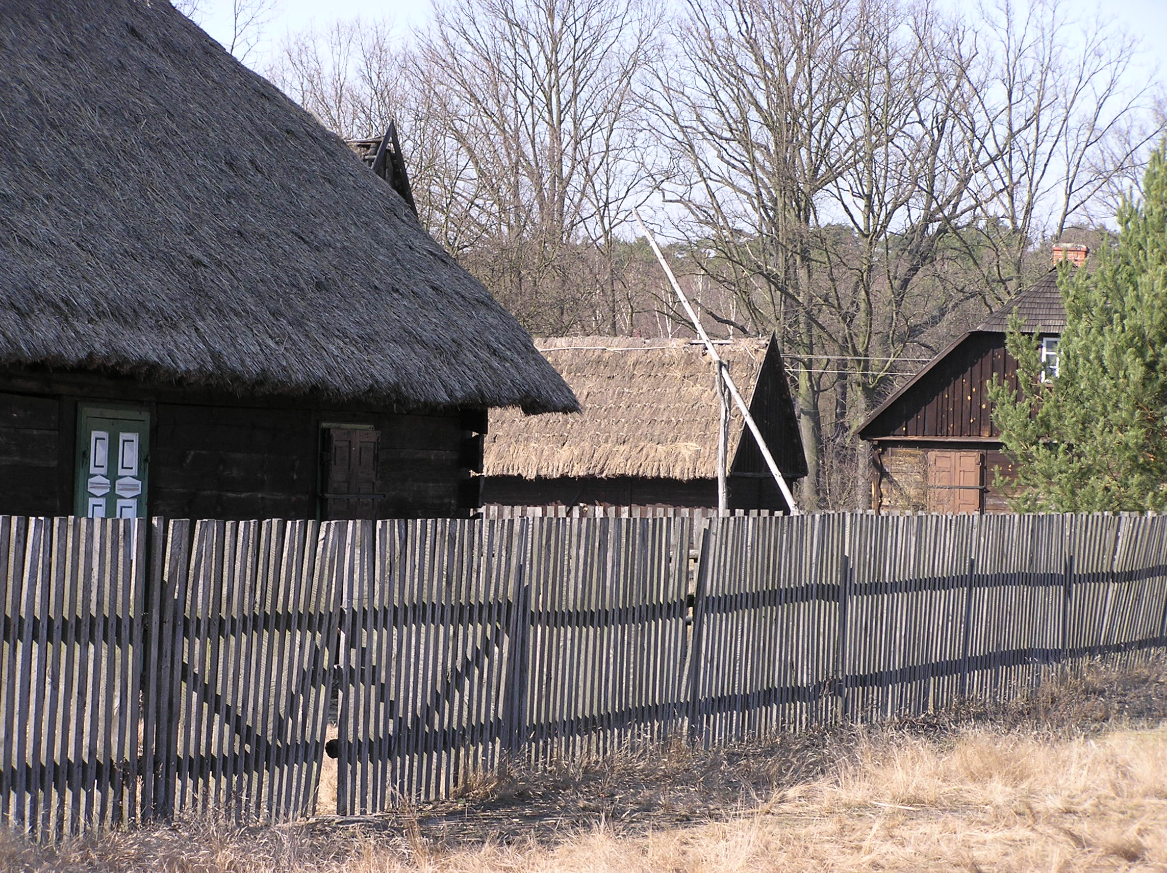 Granica, zalążek skansenu przed dyrekcją i muzeum kampinoskiego Parku Narodowego (typowe budownictwo tej wsi), gmina Kampinos